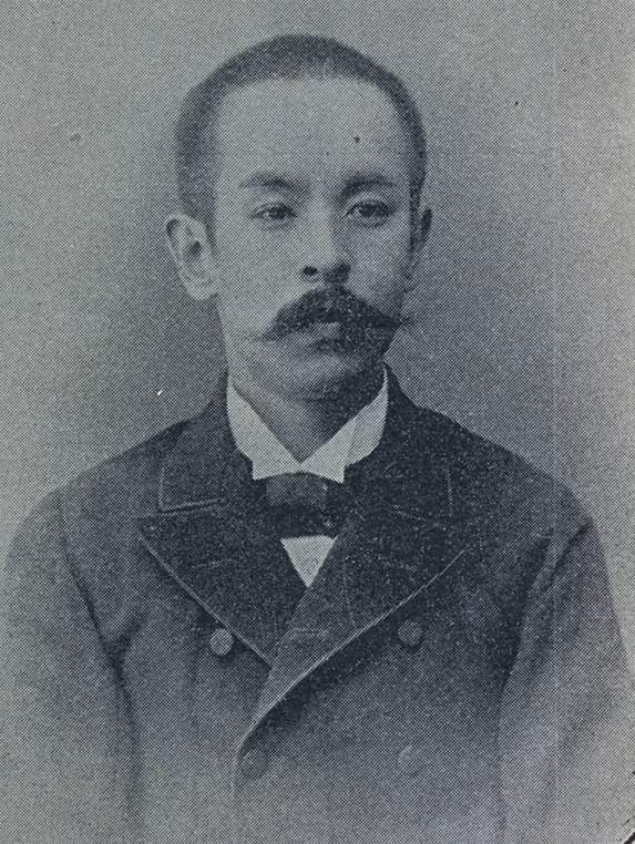 永井尚敏子爵（1871～1940）